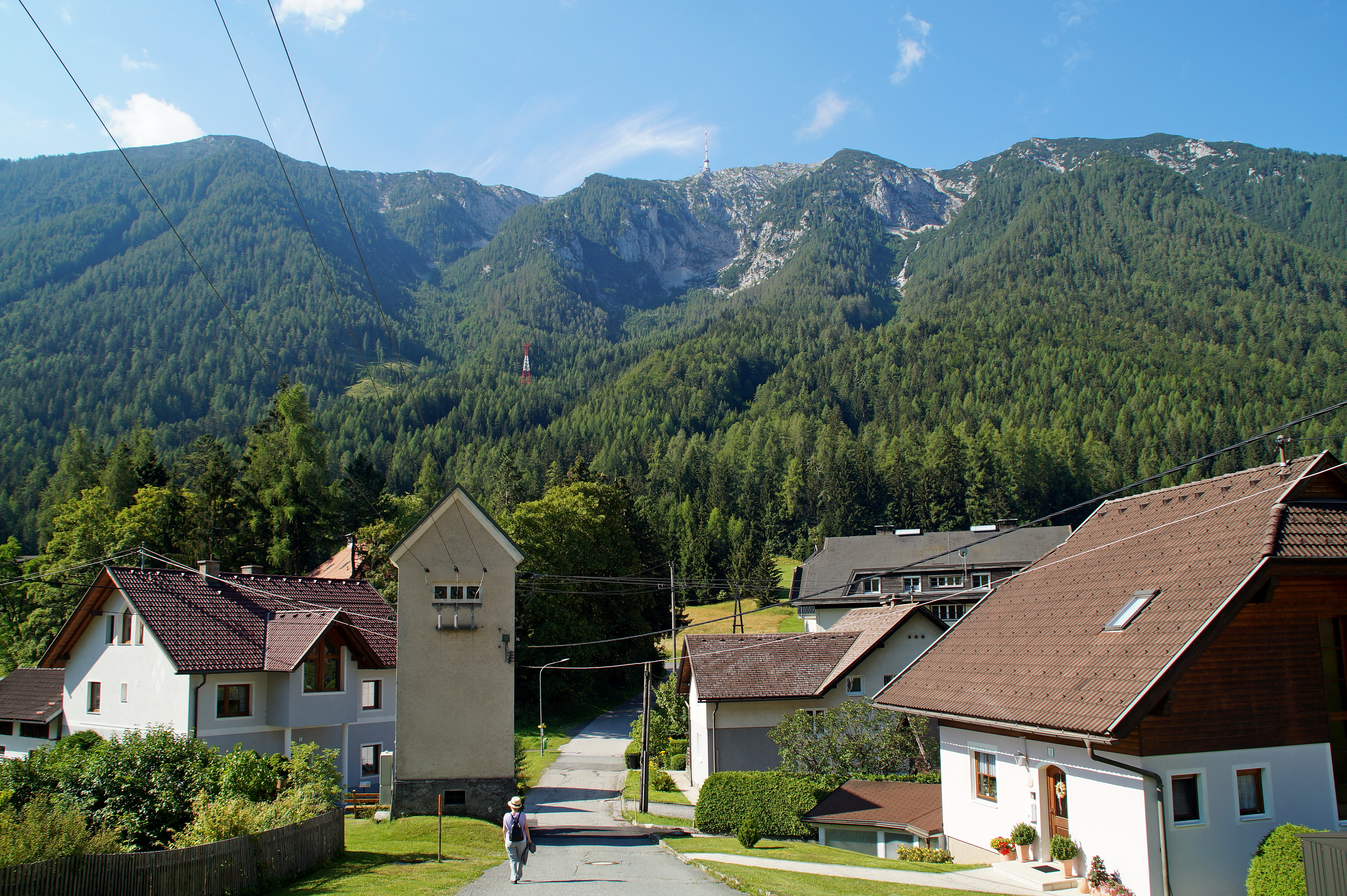 Beim Sonnenmarkt in Bad Bleiberg, Kärnten, Österreich. Blick zum Dobratsch mit dem Sendemast und zwei Stützen der Betriebsseilbahn. Im Bildmittelgund dominieren die drei Kare des Dobratsch Nordabsturzes: Alpenlahne (links), Kessellahner (Mitte), Brunnlahner (rechts).